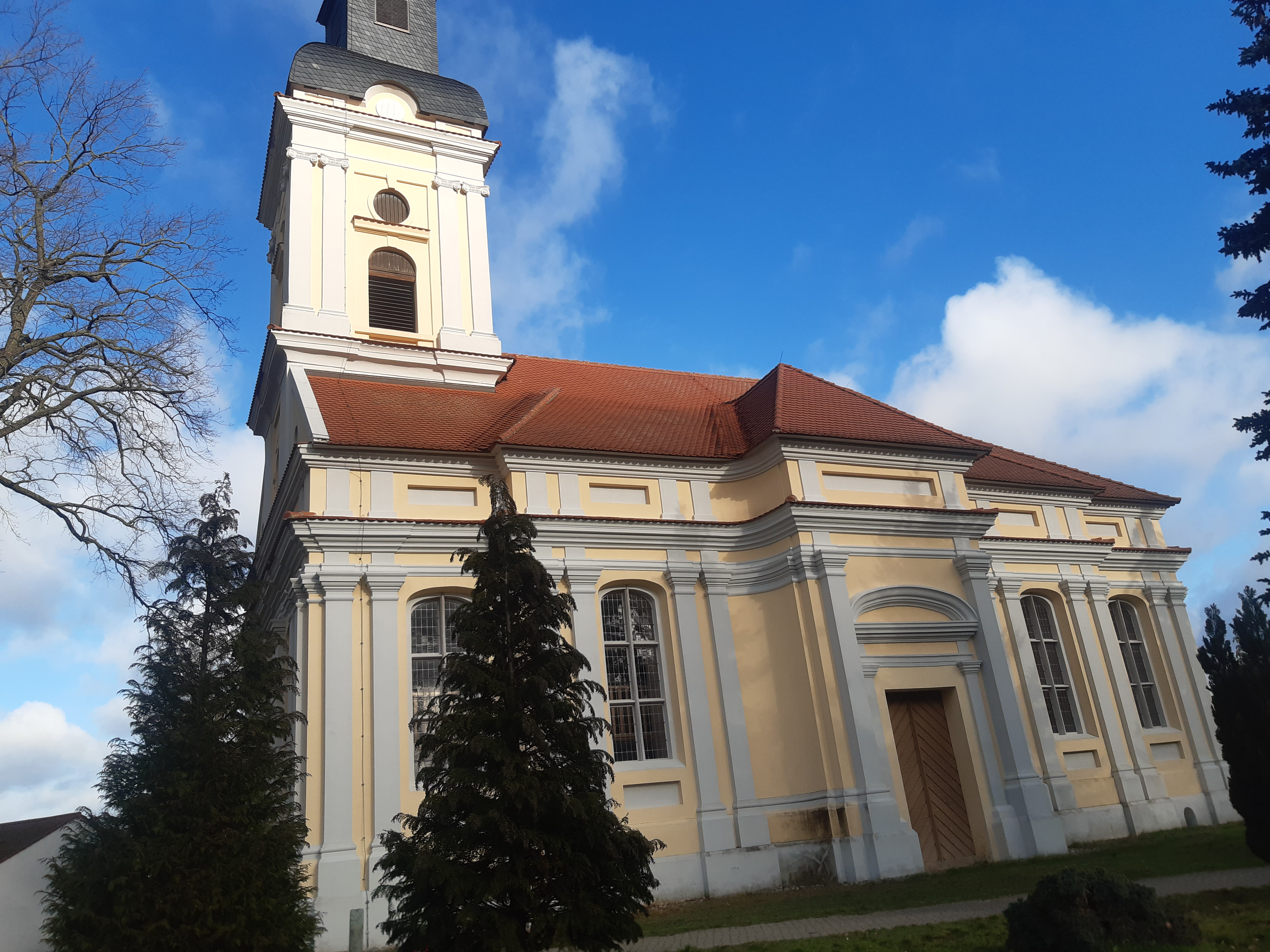 Gedenkstein